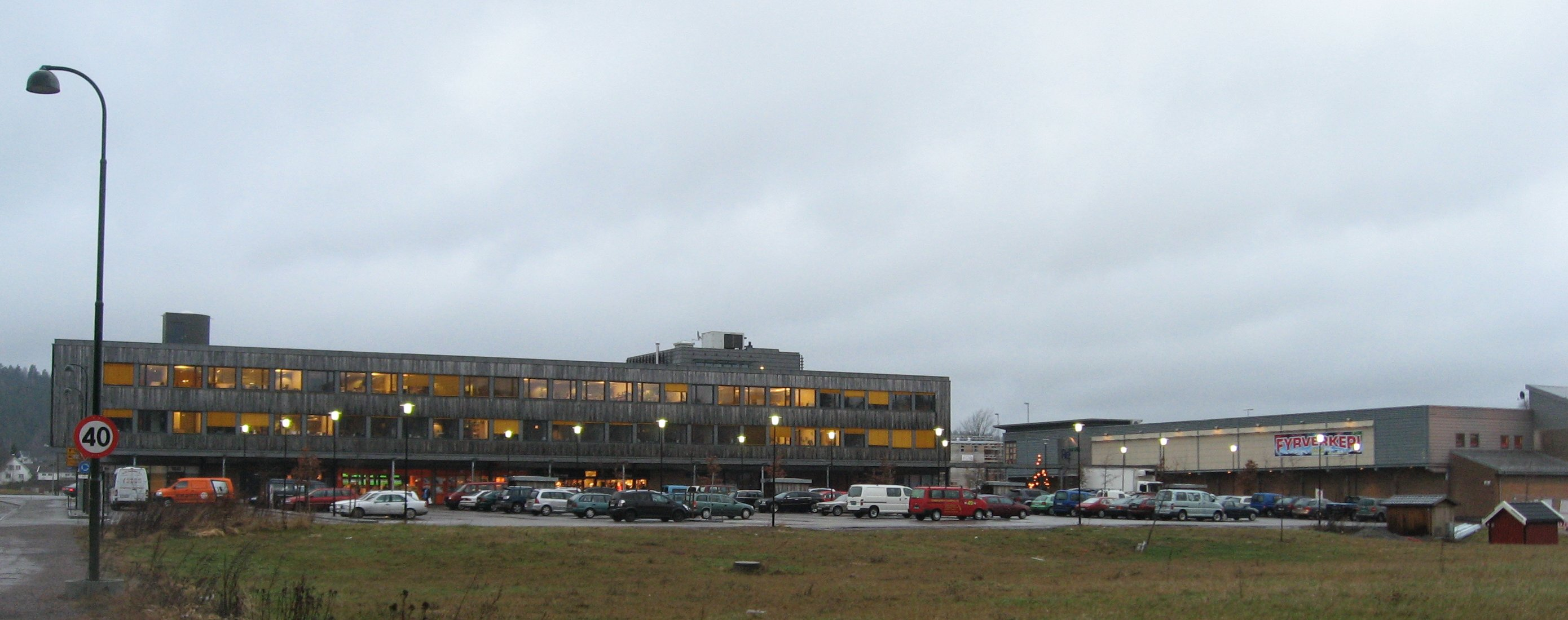 Kommunehuset i Re kommune. (Kjøpesenteret til høyre). Revetal, Norge.